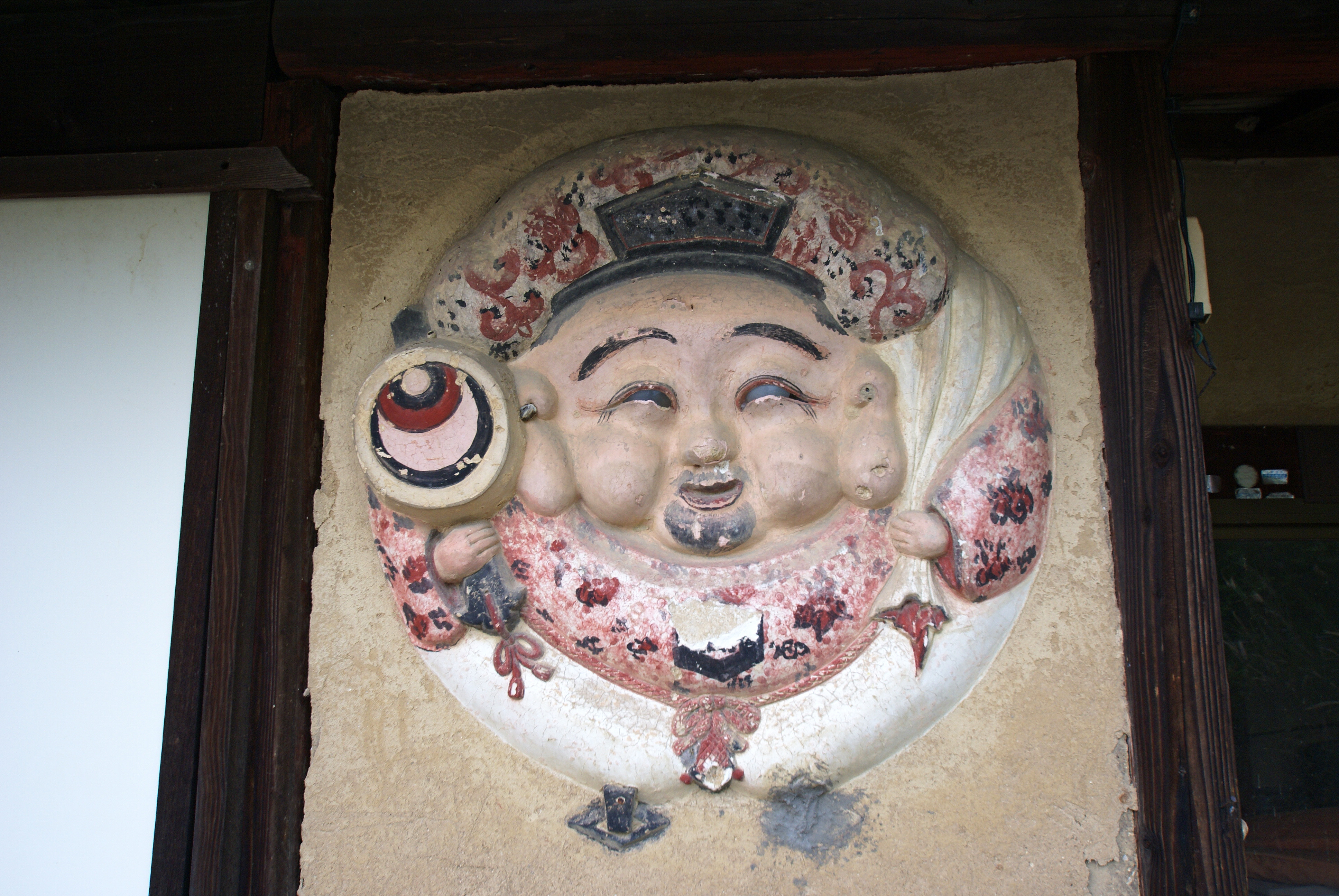 Kasajima, Hon-jima of Shiwaku Islands (Marugame, Kagawa prefecture, Japan)